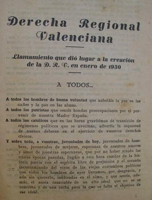 Crida que portà a la fundació de la Dreta Regional Valenciana